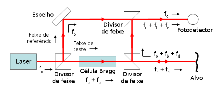 Esquema básico de um vibrômetro laser Doppler